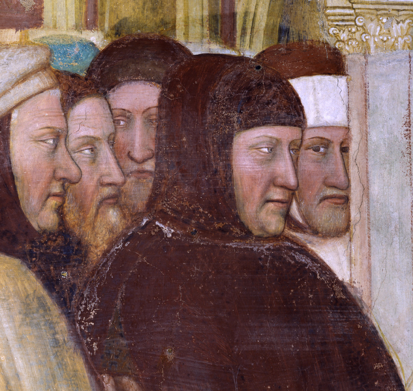 Francesco Petrarca e Lombardo della Seta (part. da San Giorgio battezza re Sevio) - Padova